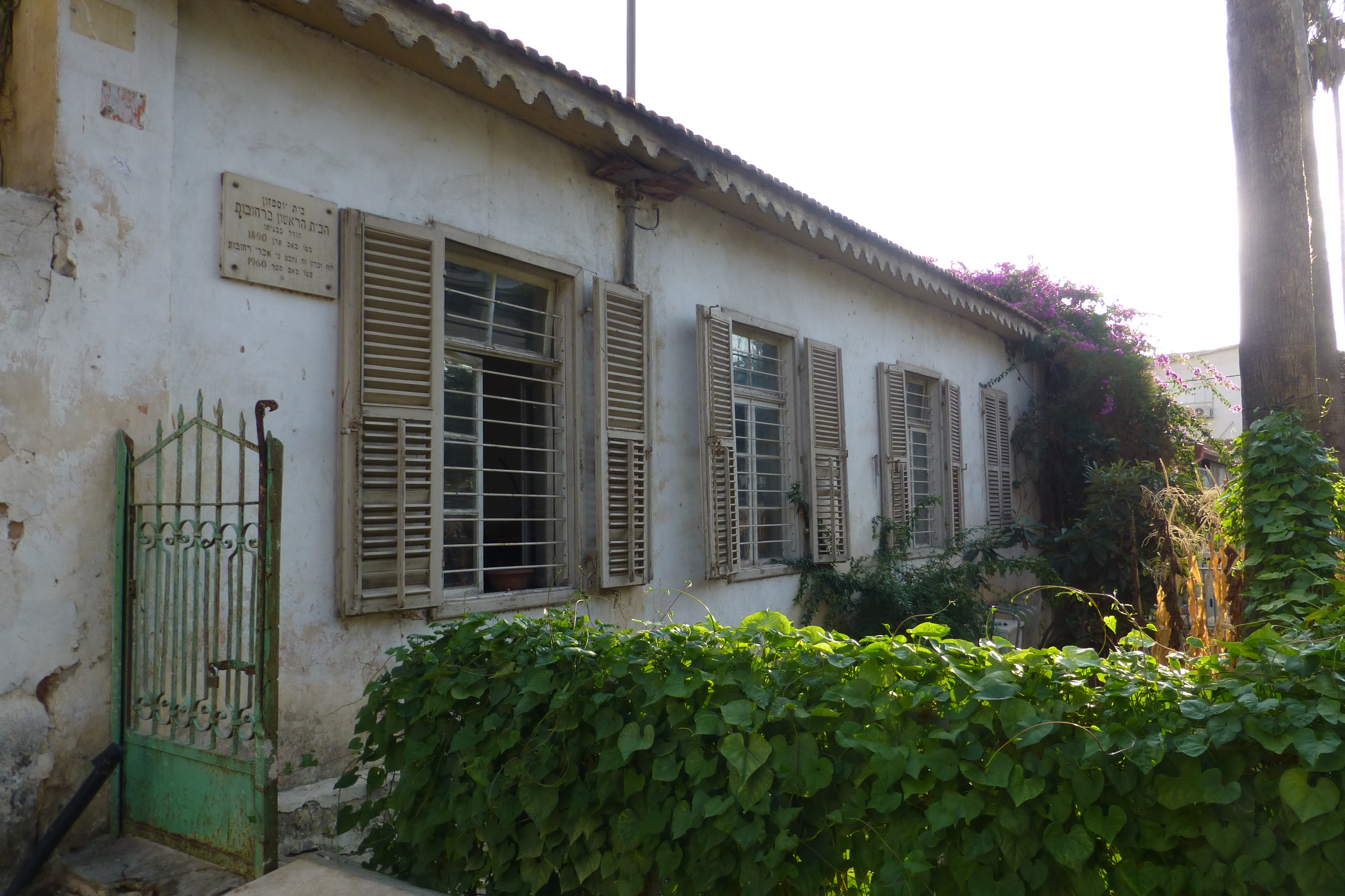 בית יוספזון - בית המגורים הראשון שנבנה ברחובות. הבניין הוא אב-טיפוס לבתים הראשונים במושבה מבחינת סגנון הבנייה, חומרי הבנייה, והחומה המקיפה אותו.